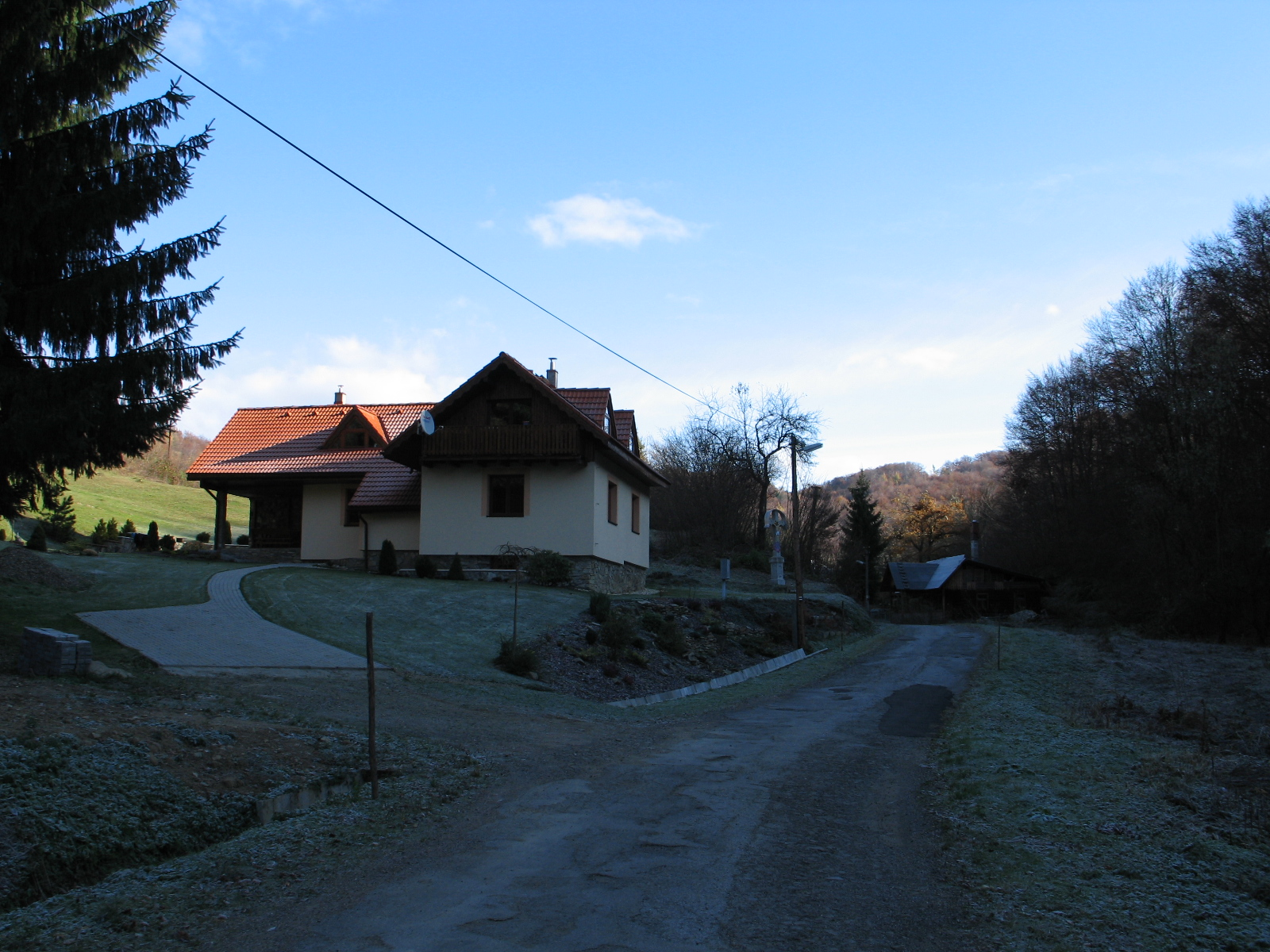 Príkra je obec s charakteristickou potočnou zástavbou v malebnom údoli Prikrianky